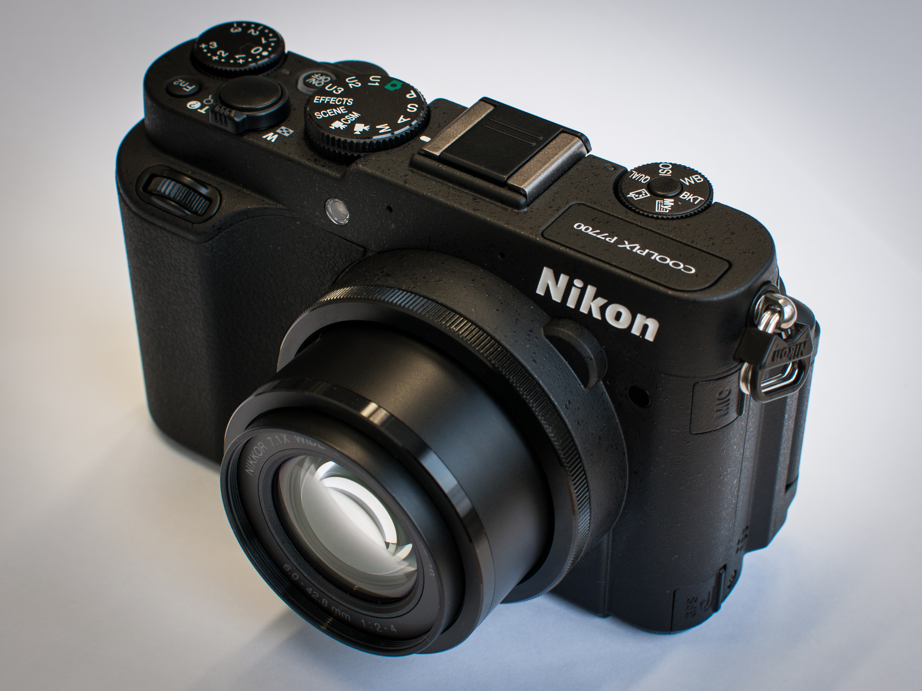 Vorderseite einer Nikon COOLPIX P7700.